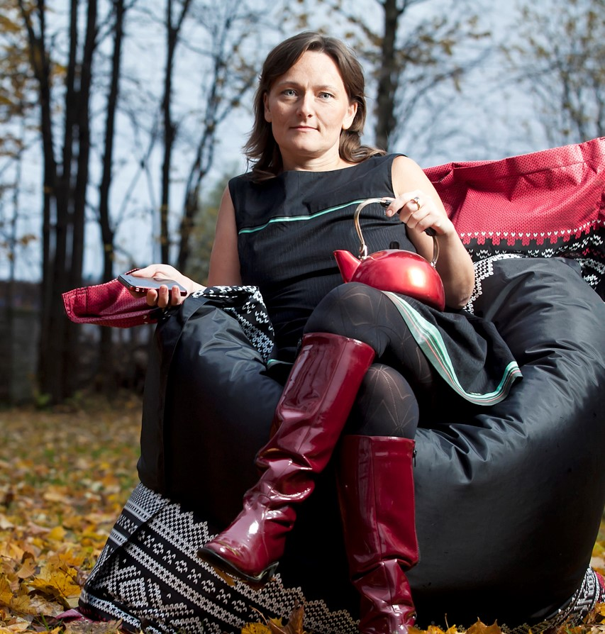 Norwegian editor and encyclopedist Anne Marit Godal (b 1972)